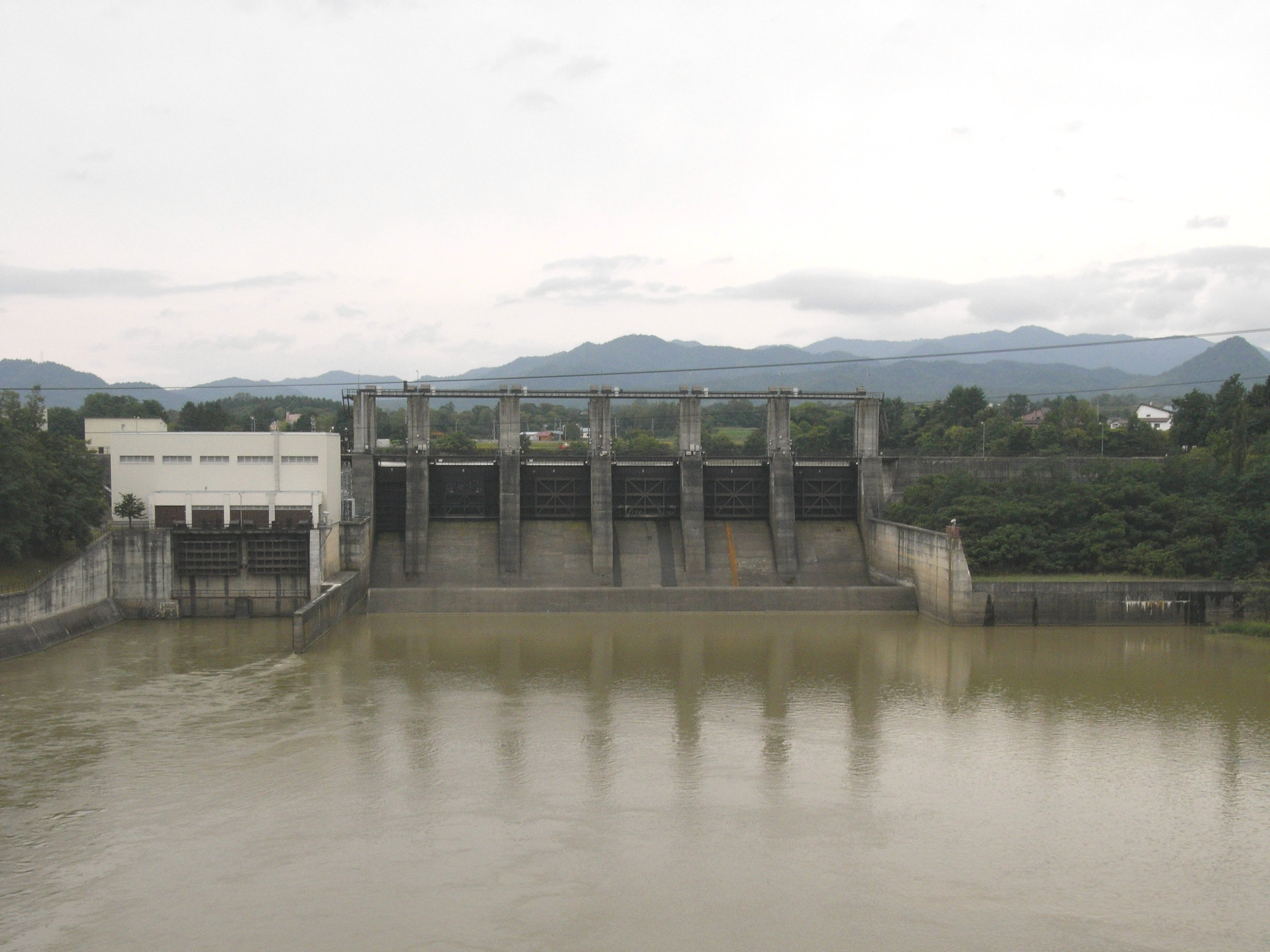 Dam